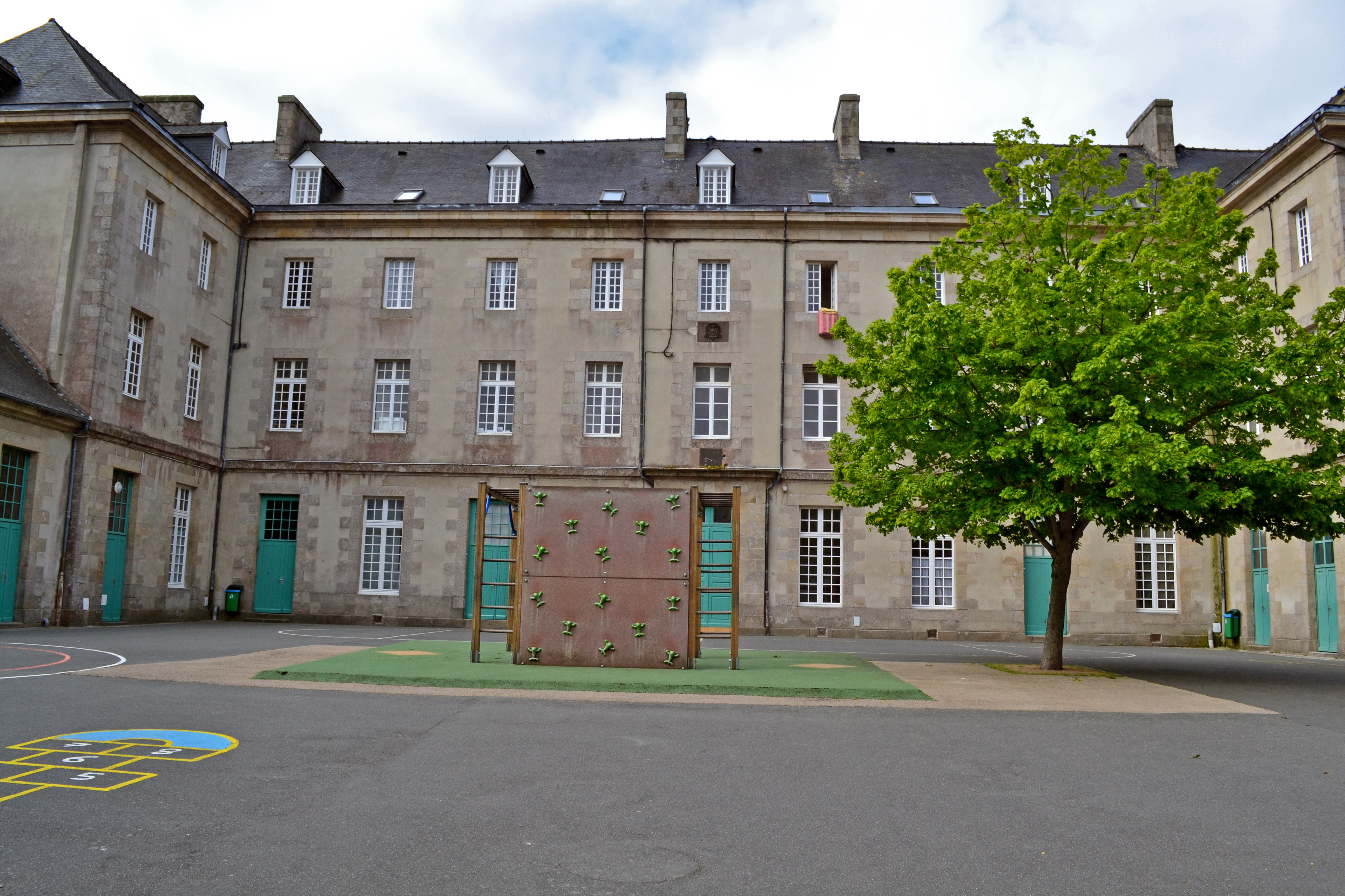 Ancien Collège de Léon inauguré en 1788 et remplacé en 1910 par l'Institution Notre-Dame du Kreisker l'année suivante.